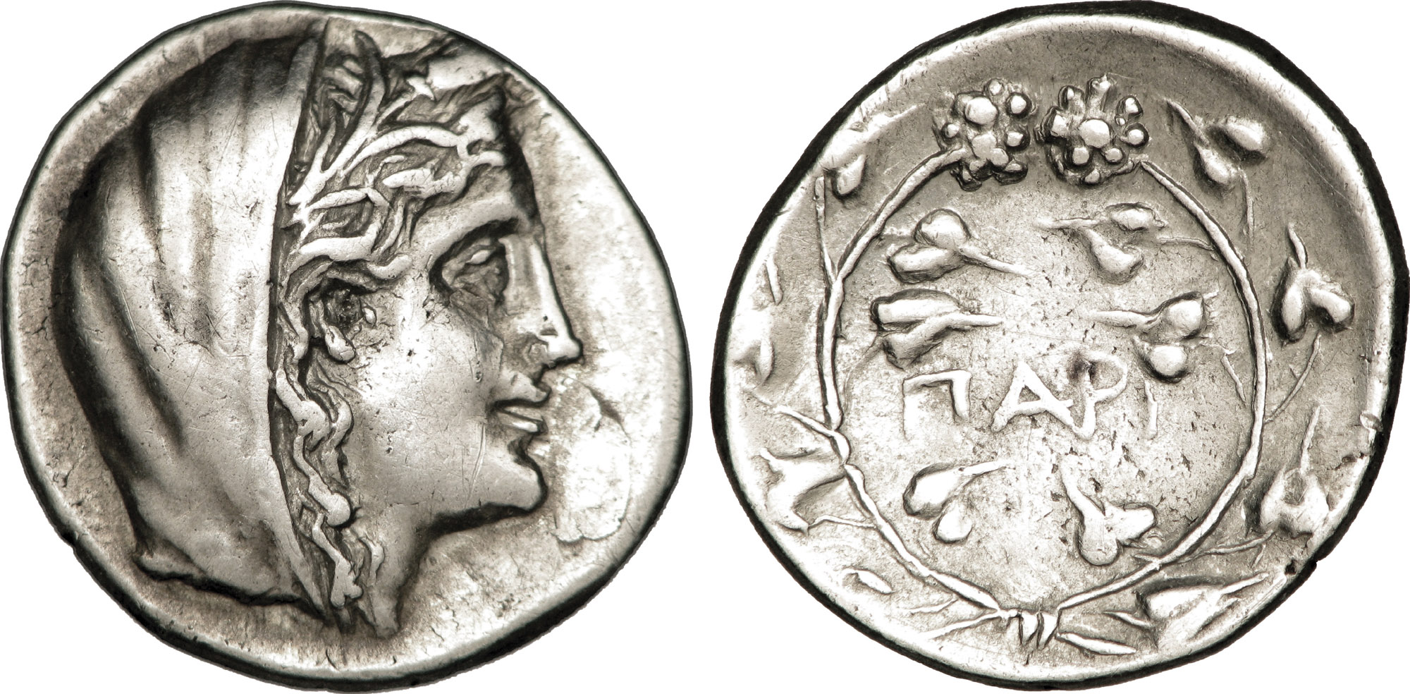 Nom de l'atelier : Cyclades, Paros Métal : argent Diamètre : 22,00mm Axe des coins : 12h. Poids : 7,71g. Titulature avers : Anépigraphe. Description avers : Tête voilée de Déméter couronnée d’épis à droite. Description revers : Légende dans une couronne dionysiaque, formée de deux branches de lierre en fruits. Légende revers : PARI. Traduction revers : (de Paros).